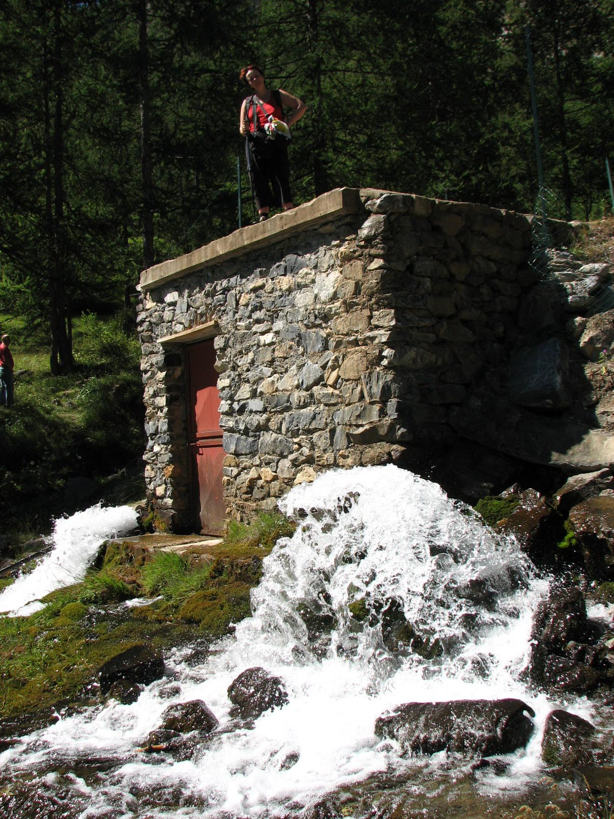 Font de riu Maira